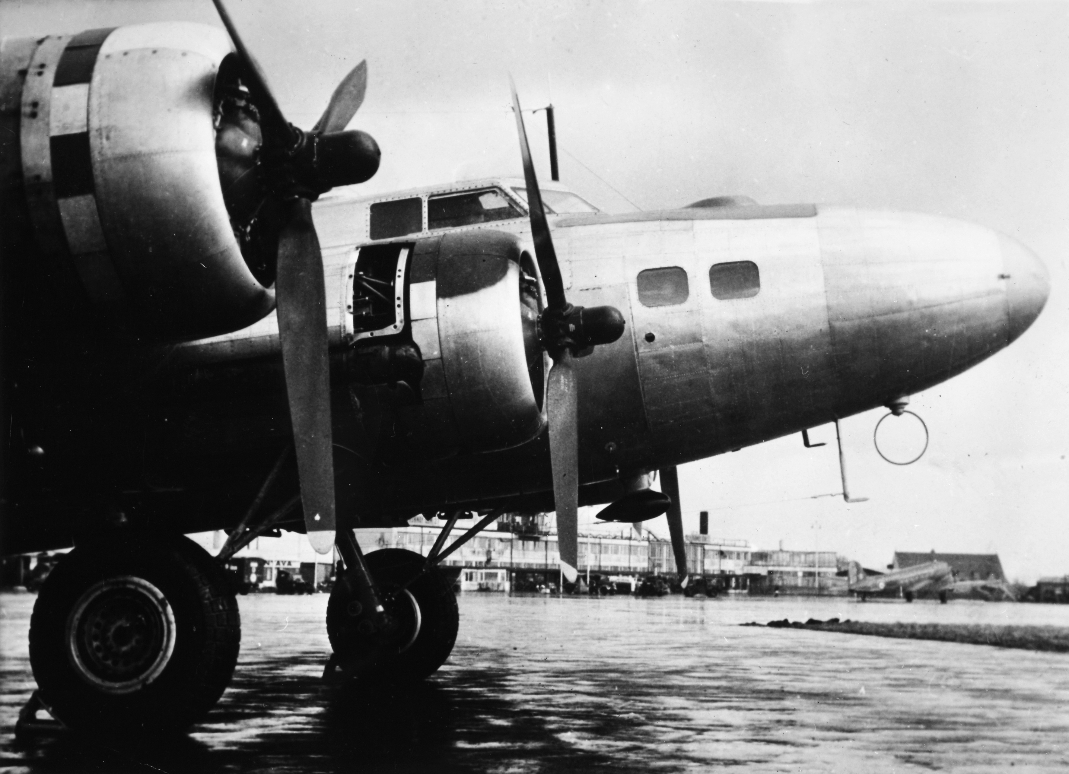 SAS Boeing B-17 1944-1948, OY-DFA, Shoo Shoo Shoo Baby